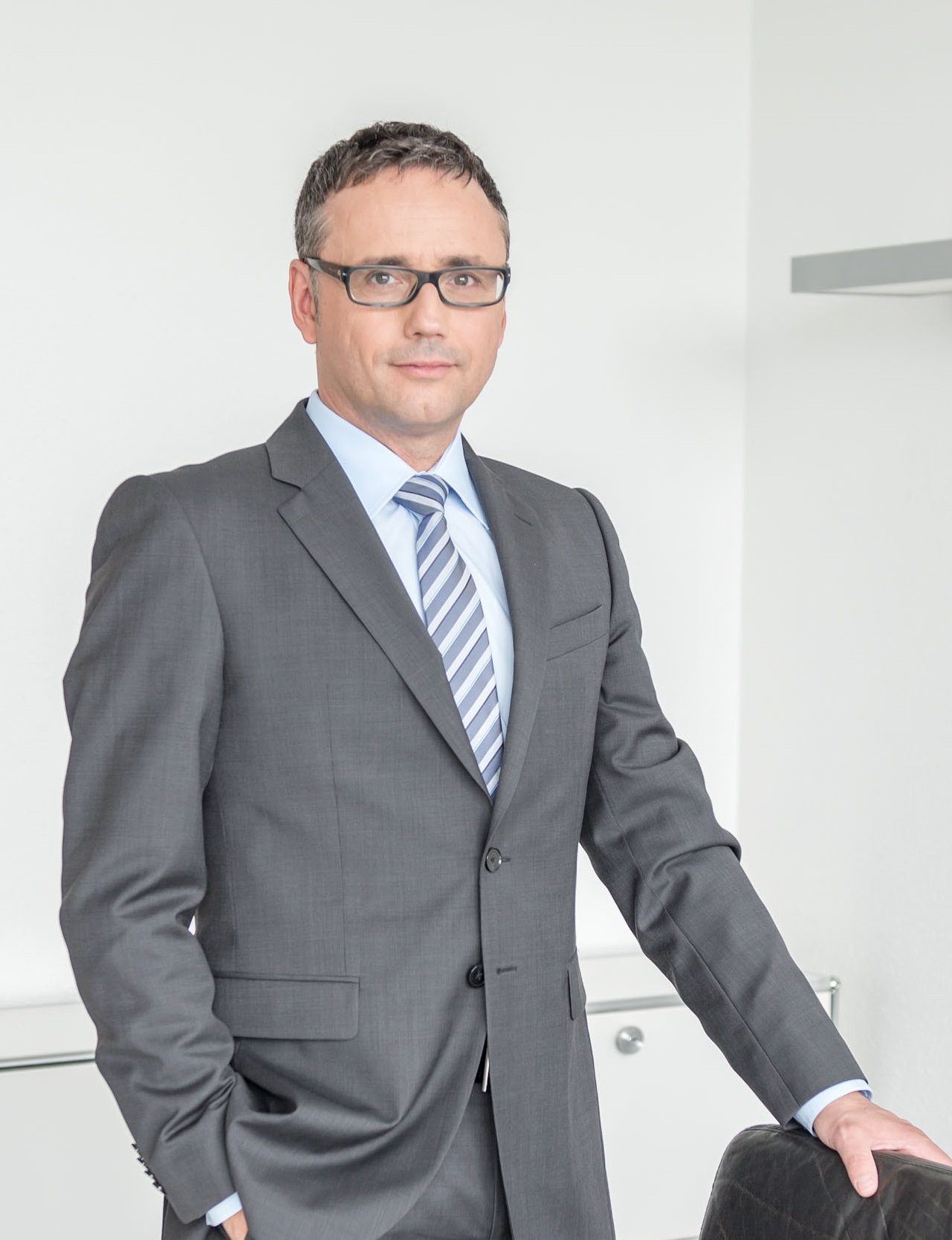 Foto von RA Dr. Mathias Dieth